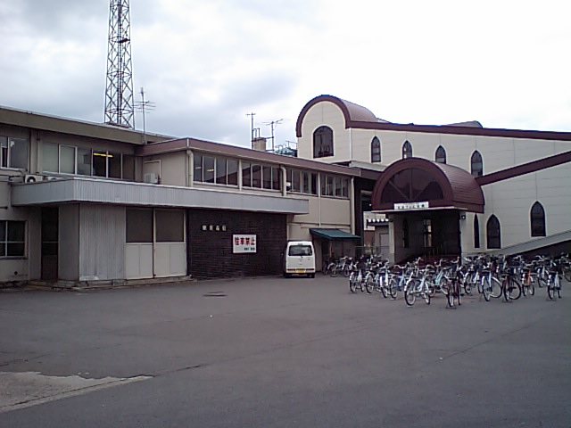 東青森駅